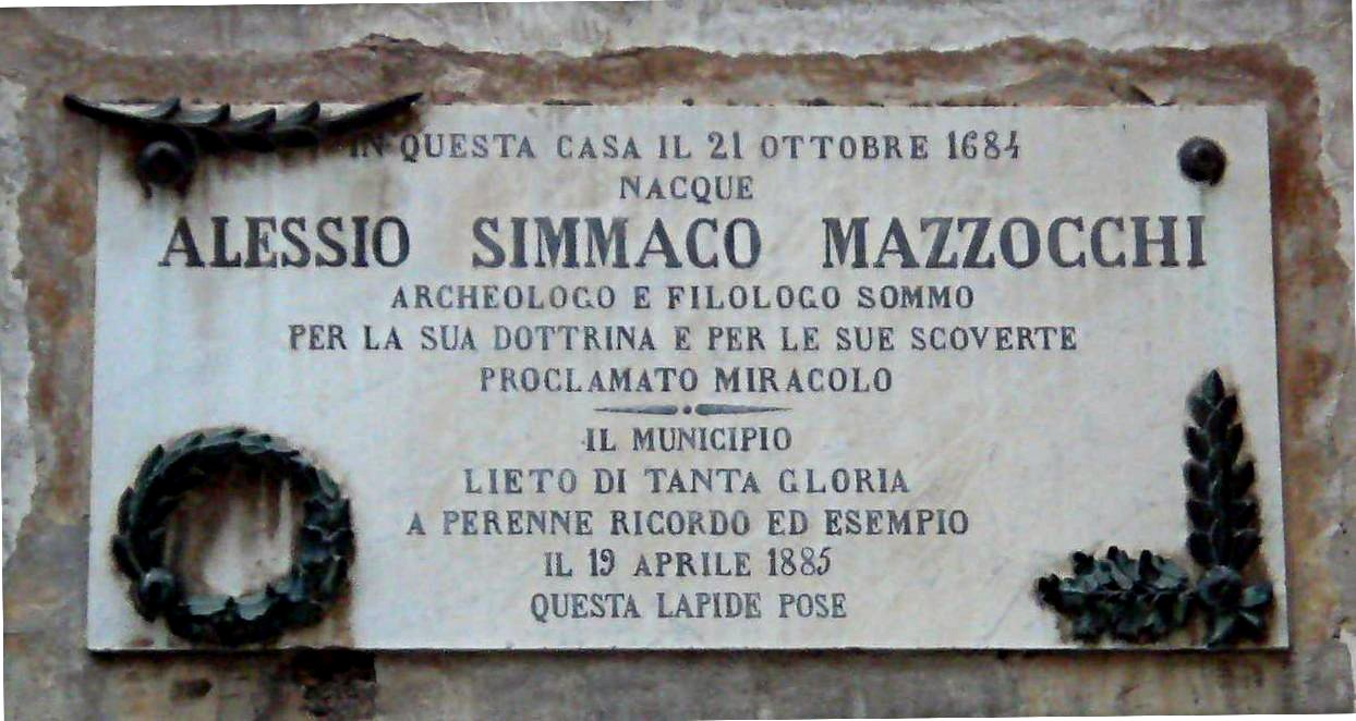 Lapide commemorativa di Alessio Simmaco Mazzocchi, situata fuori il suo palazzo natìo a Santa Maria Capua Vetere